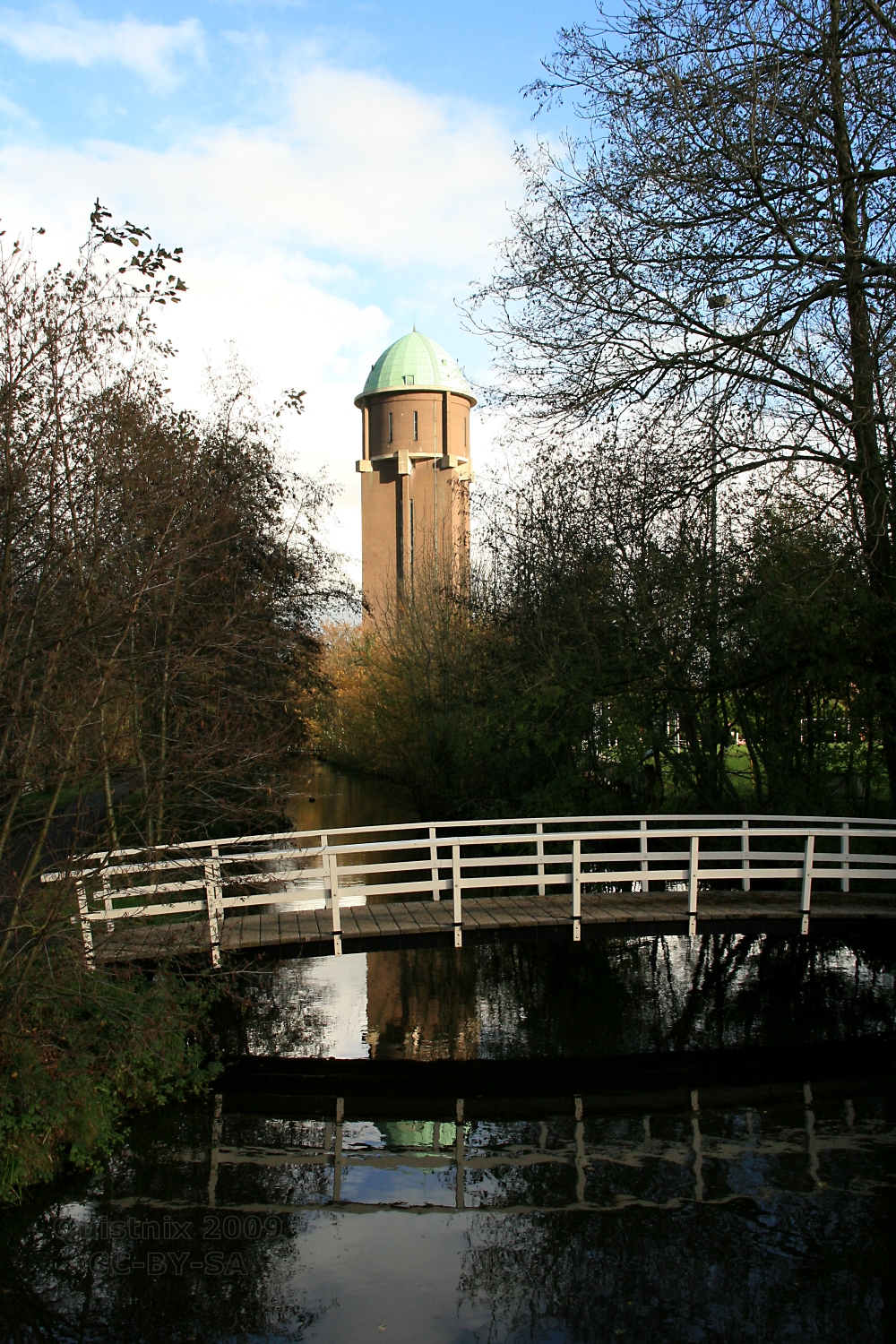 Bergambacht: Watertoren (1937) met park. Pieter Dirk Stuurman (Architect)